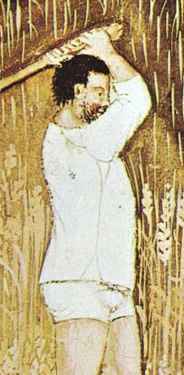 Tacuina sanitatis (XIV century) -piantagione Taccuino Sanitatis Casanatense 4182 shirt.